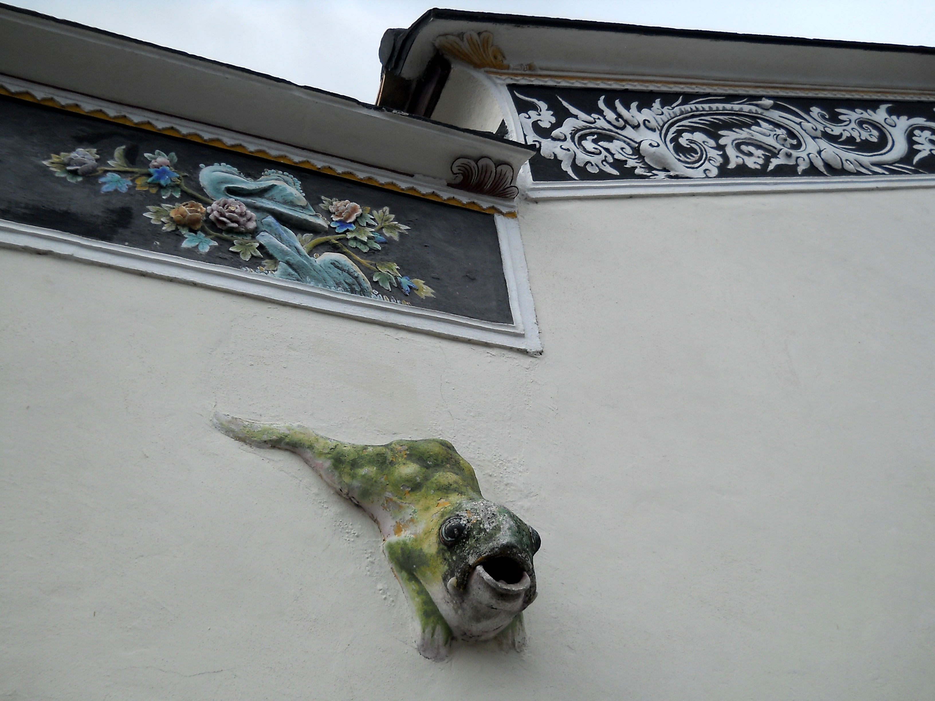 中文（香港）: 黃竹坑新圍舊民居蟾蜍出水口